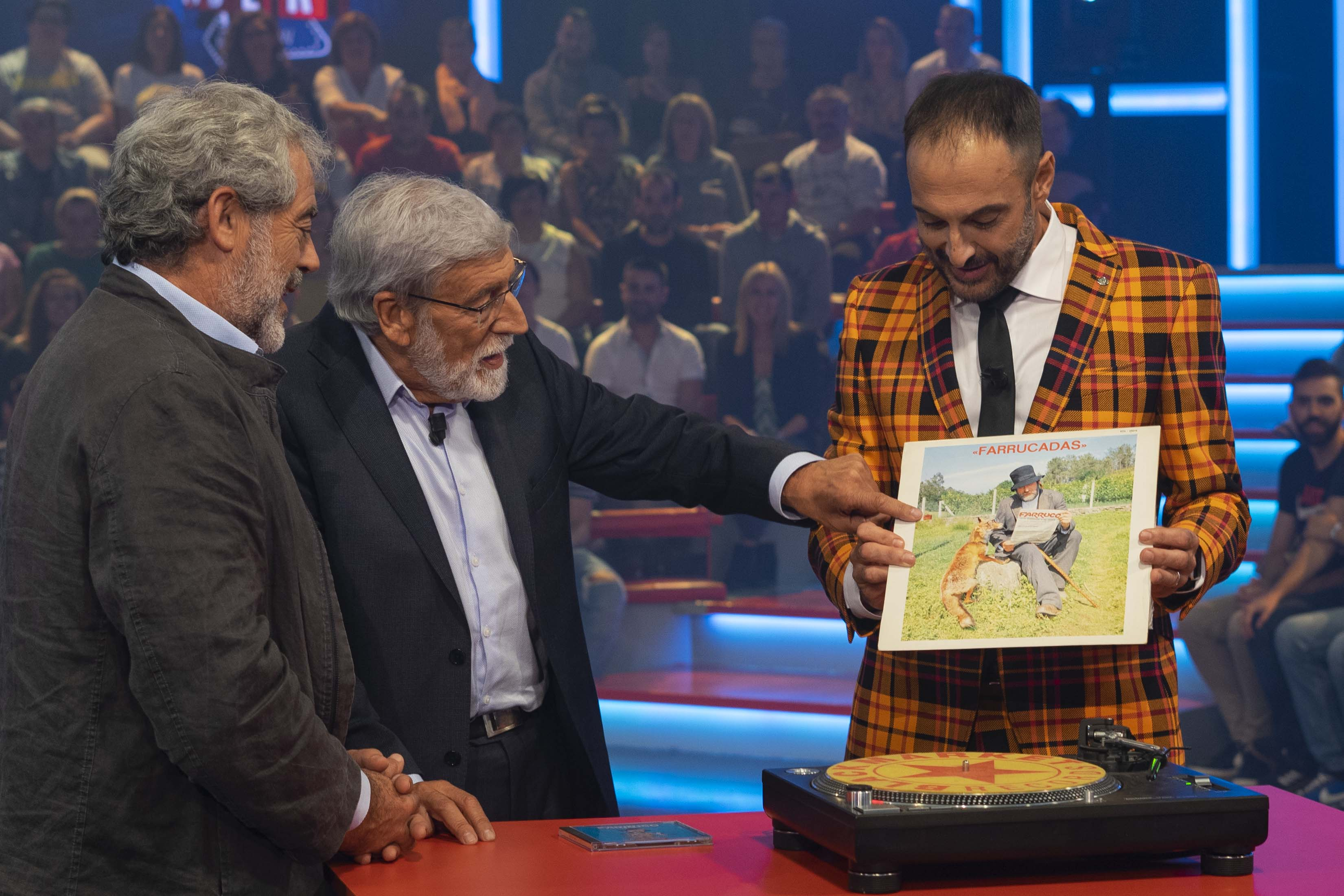 Farruco xunto a Carlos Blanco sinalando o disco de vinilo de chistes Farrucadas que sostén Roberto Vilar no Land Rober Tunai Show